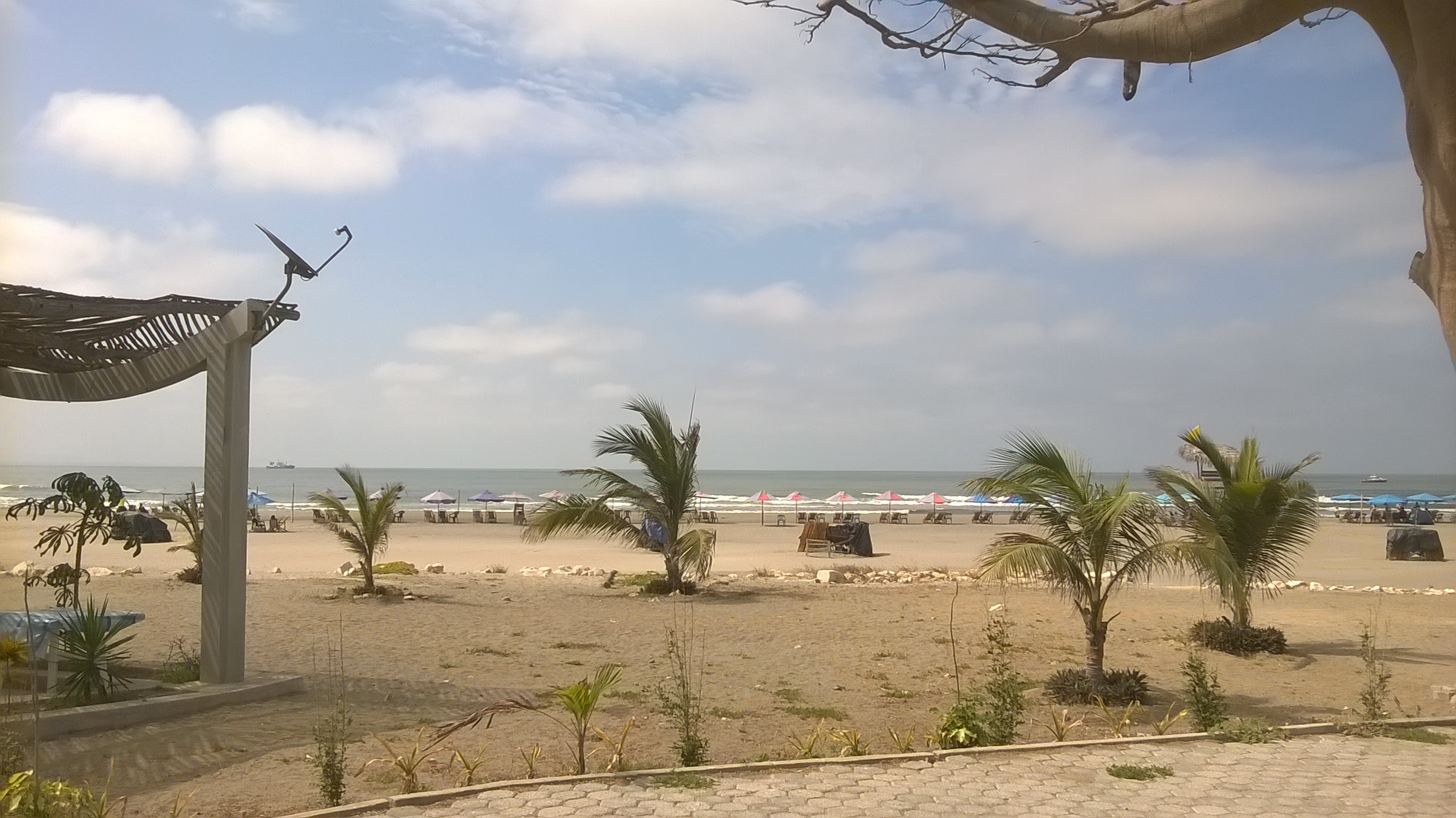 Vista parcial de playa Varadero del cantón Guayaquil